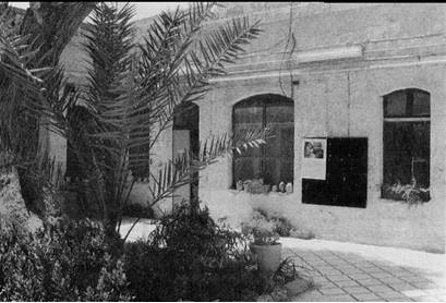 המבנה בו שוכן מרכז אומנויות